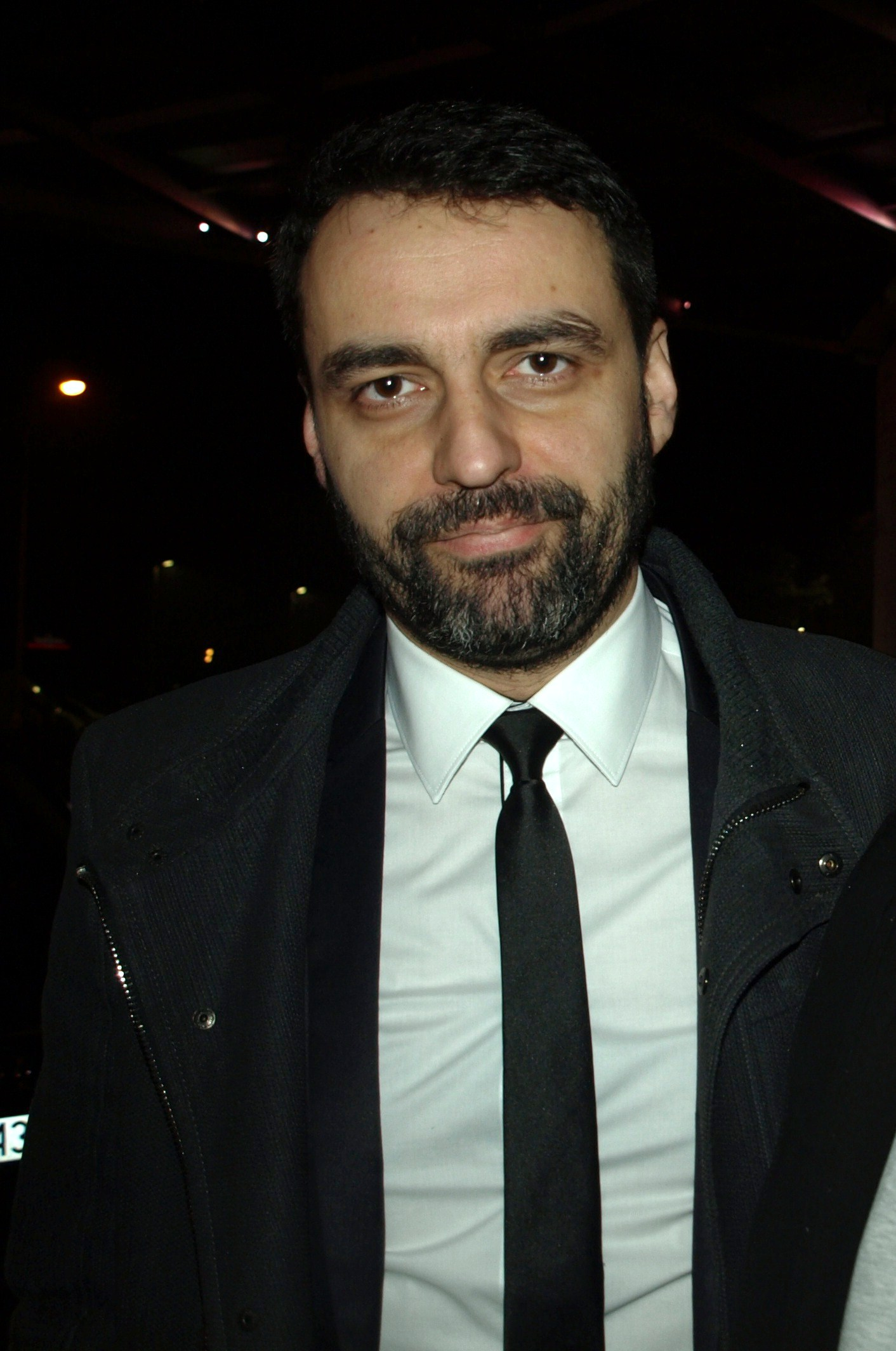 Tomasz Mandes